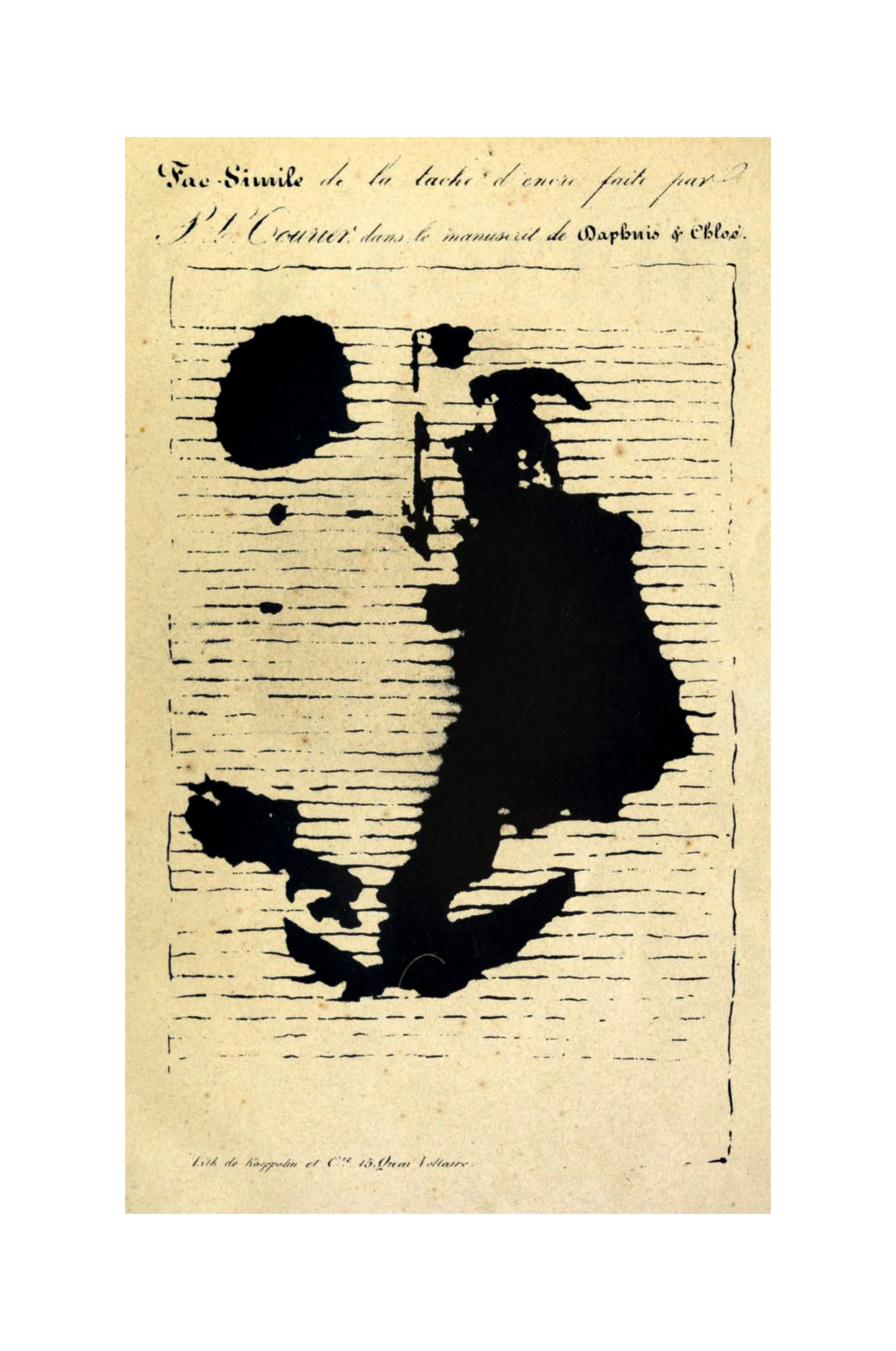 Illustration